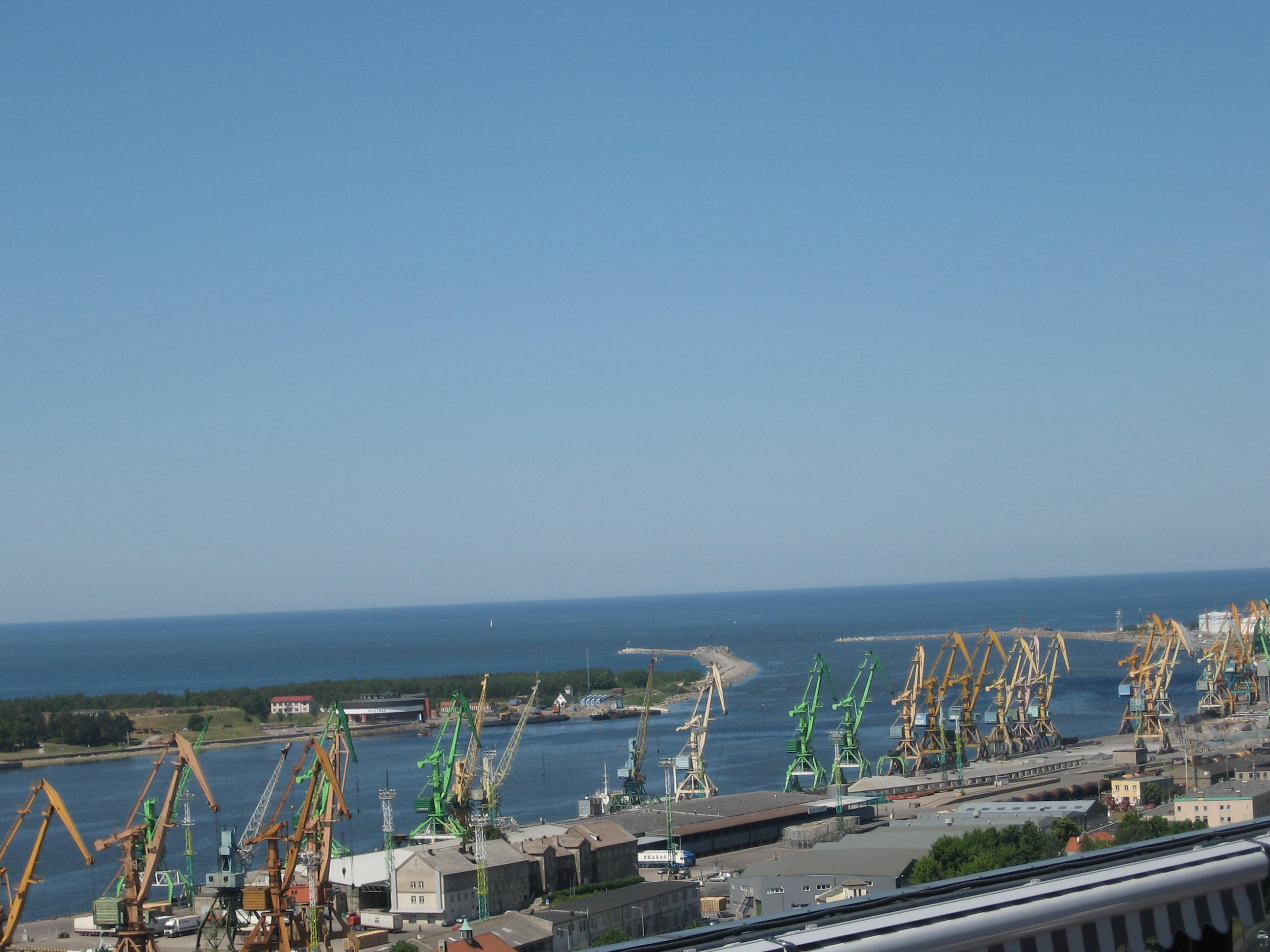 Klaipėdos jūrų uostas